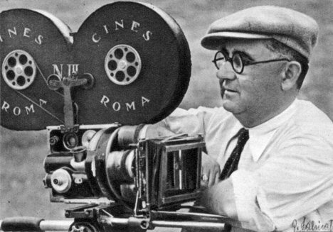 photo from Italian magazine Cinema, II, 23, 10 June 1937, p. 447.